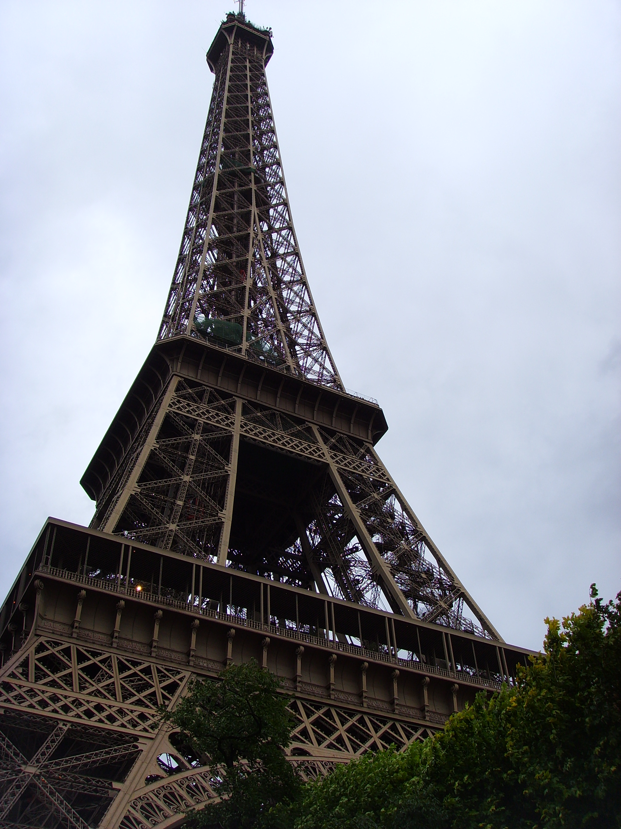 Tour Eiffel, Paris